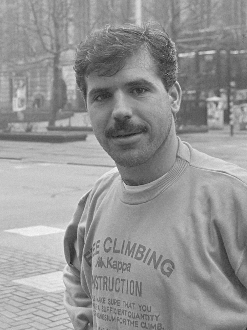 EK-kwalificatiewedstrijd Nederland tegen Griekenland a.s. woensdag; Mitropoulos (l) en Anastopoulos (r) in Rotterdam 24 maart 1987